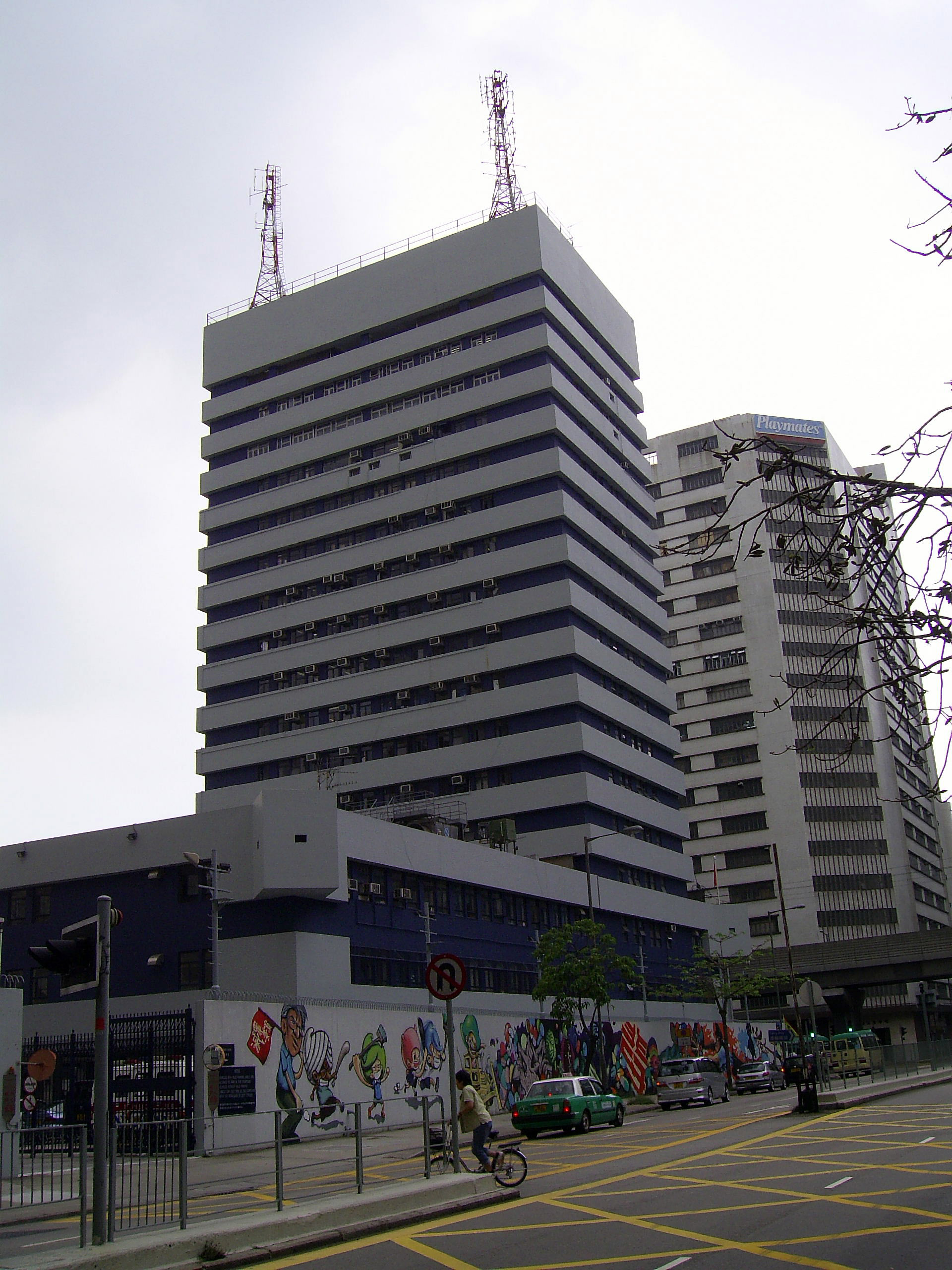 中文（香港）: 屯門警署